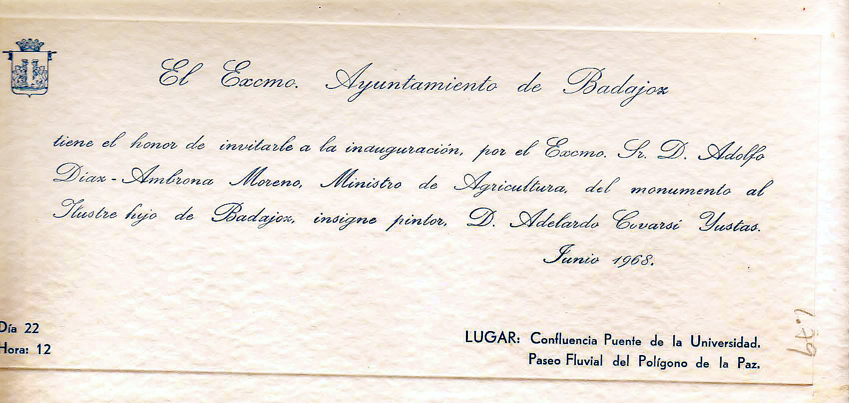 Tarjeta de invitación a la inauguración del monumento a Adelardo Covarsí celebrada en Badajoz a las 12:00 horas del 22 de junio de 1968.